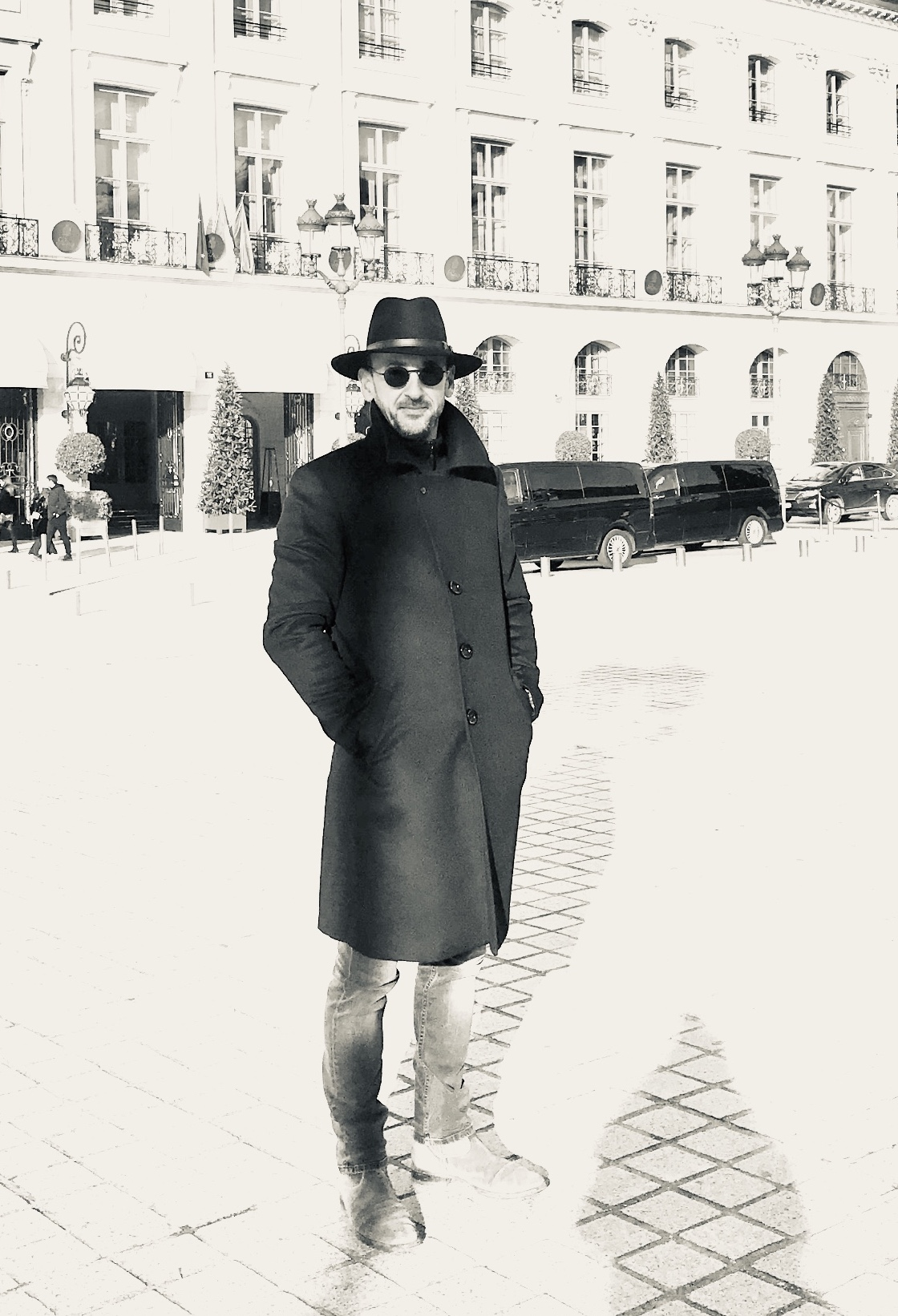 vincent gild en 2020